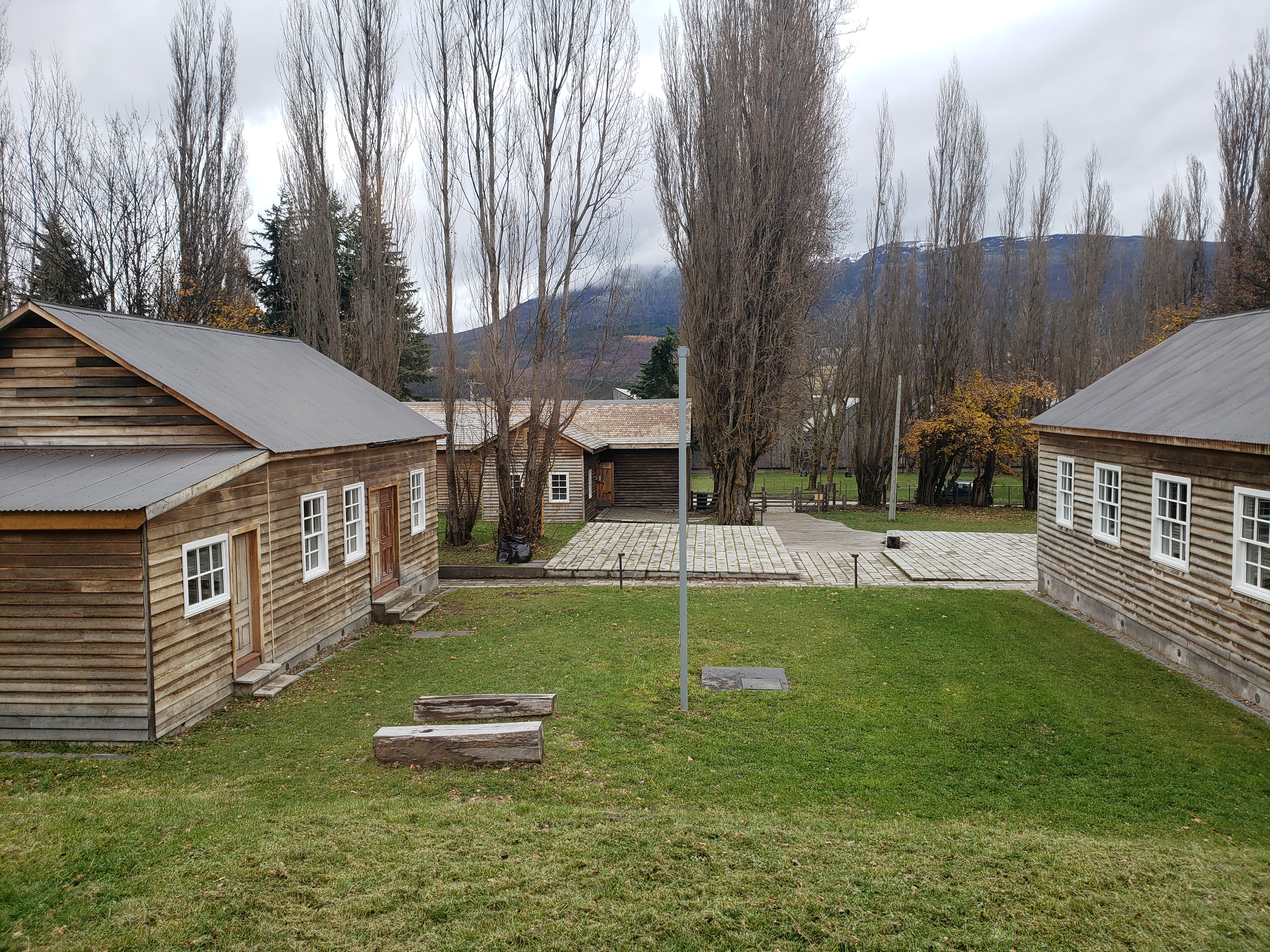 Edificios del Museo Regional de Aysén, en Coyhaique, Chile.